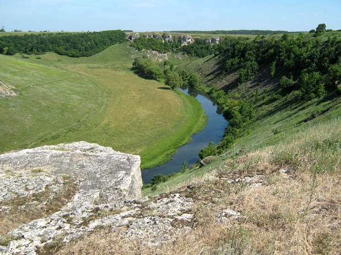 Галичья гора, Елецкий район This image is related to the protected area of Russia number 4800053